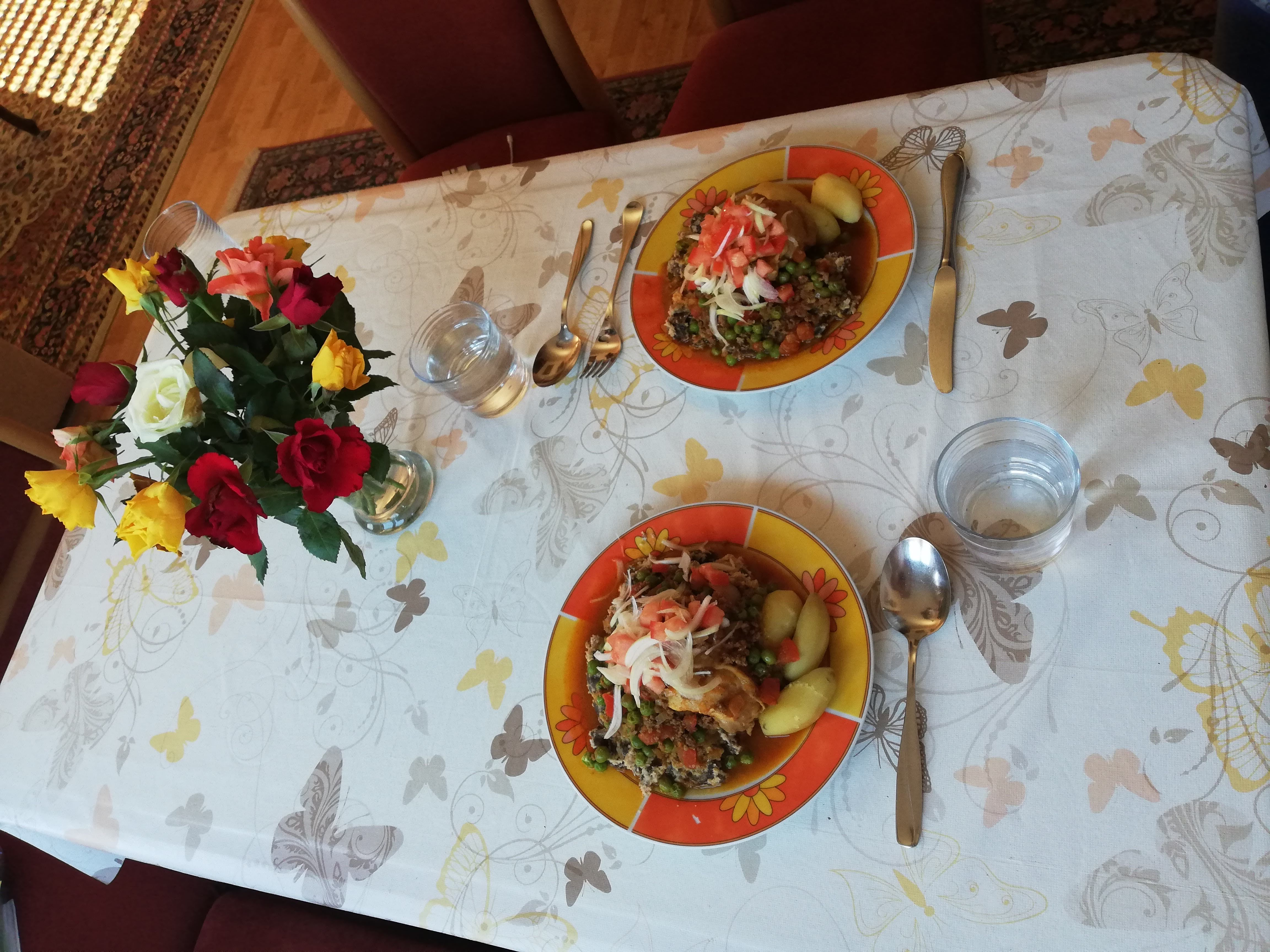 Plato típico con ingrediente principal, chuño